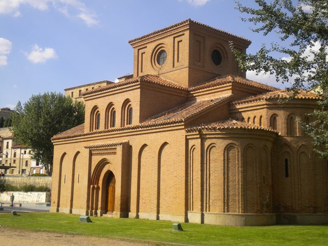 Salamanca - España